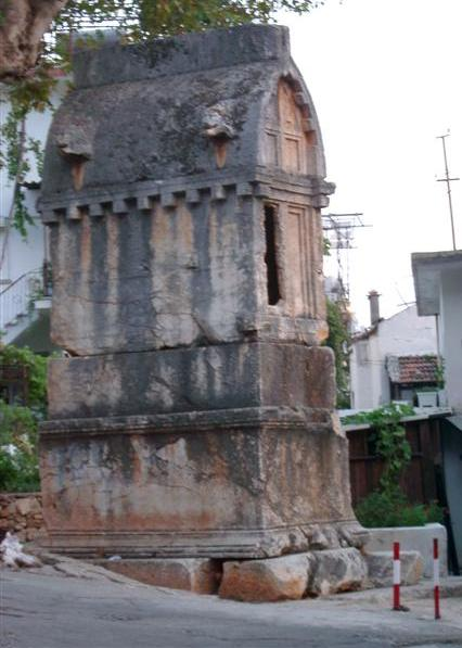 Beschreibung: Lykischer Sarkophag in Kaş (Türkei). Fotograf: Eigene Aufnahme von Benutzer:Sjoehest im August 2002. Lizenz: GNU freie Dokumentationslizenz. Bild:Sarkophag in Kas.jpg